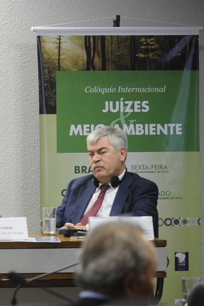 A Comissão de Constituição, Justiça e Cidadania (CCJ) realiza audiência pública com a presença de altos magistrados de cortes nacionais e internacionais para debater o papel dos juízes na proteção ambiental. O “Colóquio Internacional – Juízes e Meio Ambiente” visa comparar o modelo brasileiro com a experiência latino-americana. A audiência foi requerida pelo presidente da comissão, senador Vital do Rêgo (PMDB-PB). (E/D): pesquisador da George Washington University, Nicholas Bryner; presidente da Suprema Corte de Justiça da República do Manin, Ousmane Batoko; senador Aníbal Diniz (PT-AC); professor da Pace University, Nicholas Robinson; minsitra da Suprema Corte da Noruega, Ragnhild Noer; ministro da Corte Constitucional da Bélgica e presidente do Fórum de Juizes pelo Meio Ambiente da União Européia, Luc Lavrysen. Foto: Marcos OliveiraAgência Senado